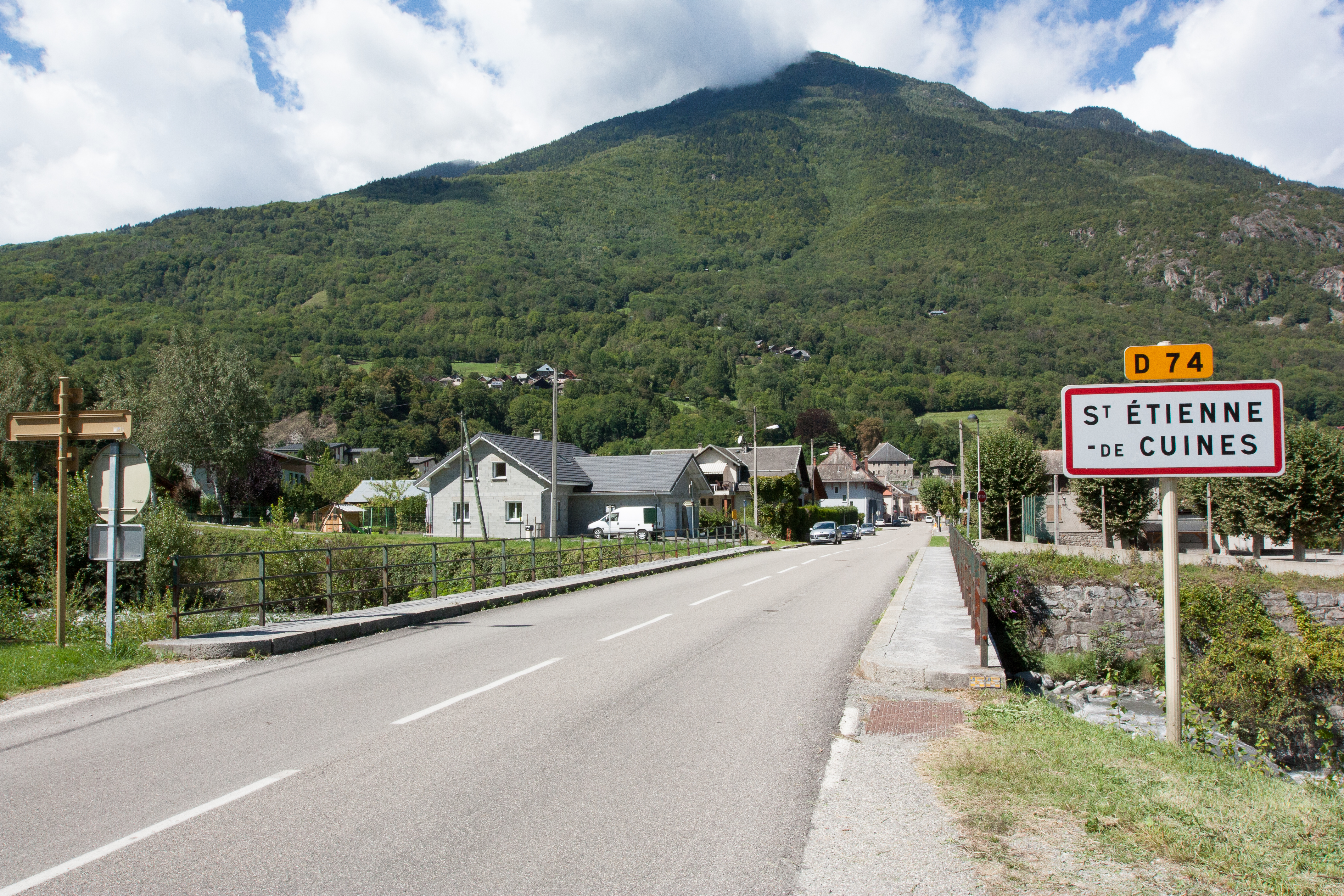 Vue de Saint-Étienne-de-Cuines / Saint-Étienne-de-Cuines / Savoie / France